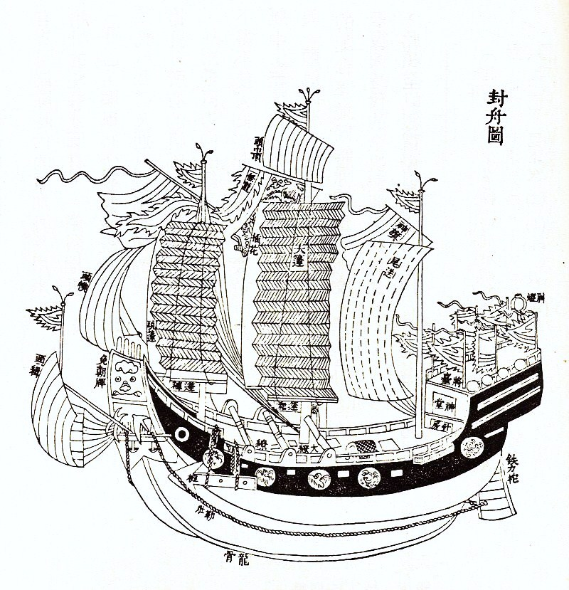 中文（台灣）: 《琉球國志略》一書中的航海帆船。